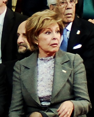 Tesoros vivos de la Televisión